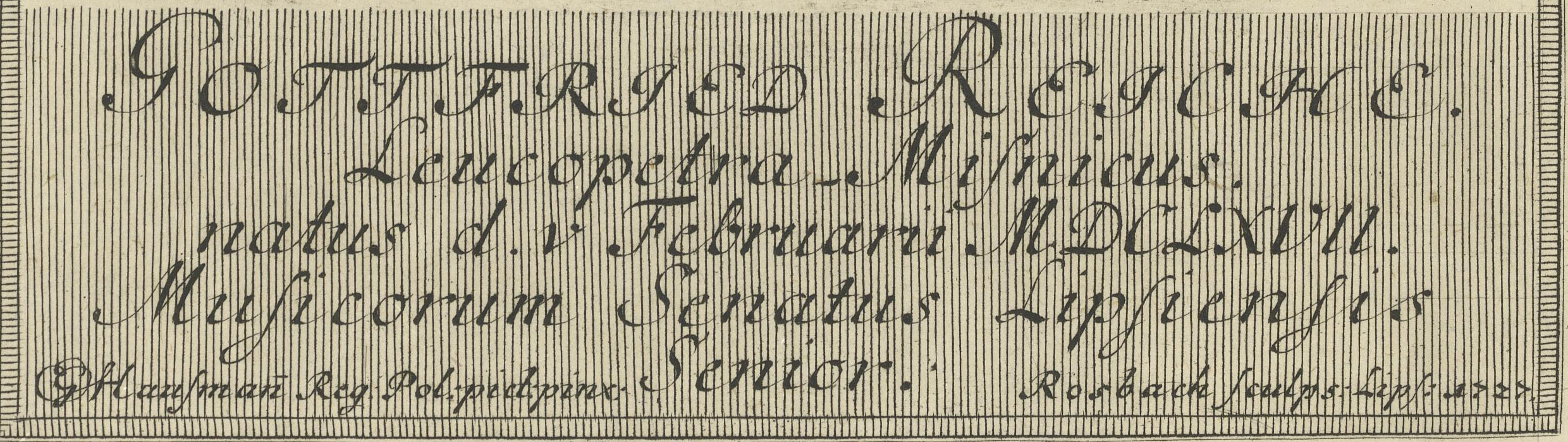 Ausschnitt eines Stiches von Johann Friedrich Rosbach nach dem Ölgemälde von Elias Gottlob Haußmann; Gottfried Reiches Name, Herkunft, Geburtsdatum und Titel